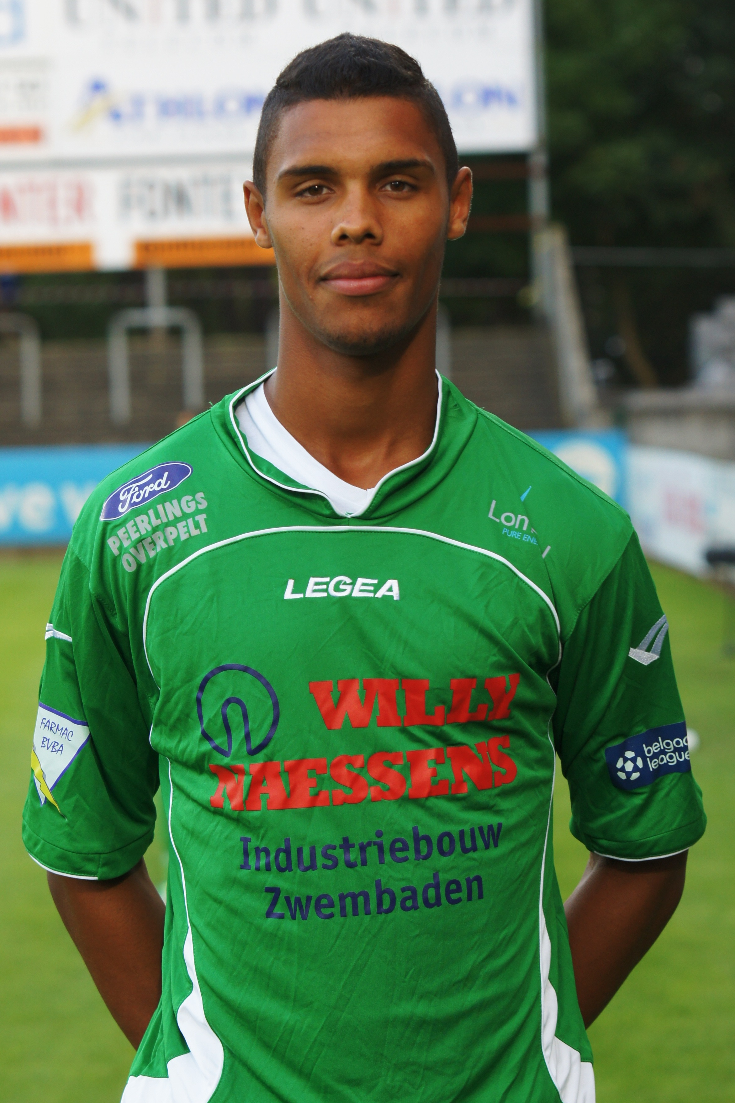 Profielfoto Zinho Gano